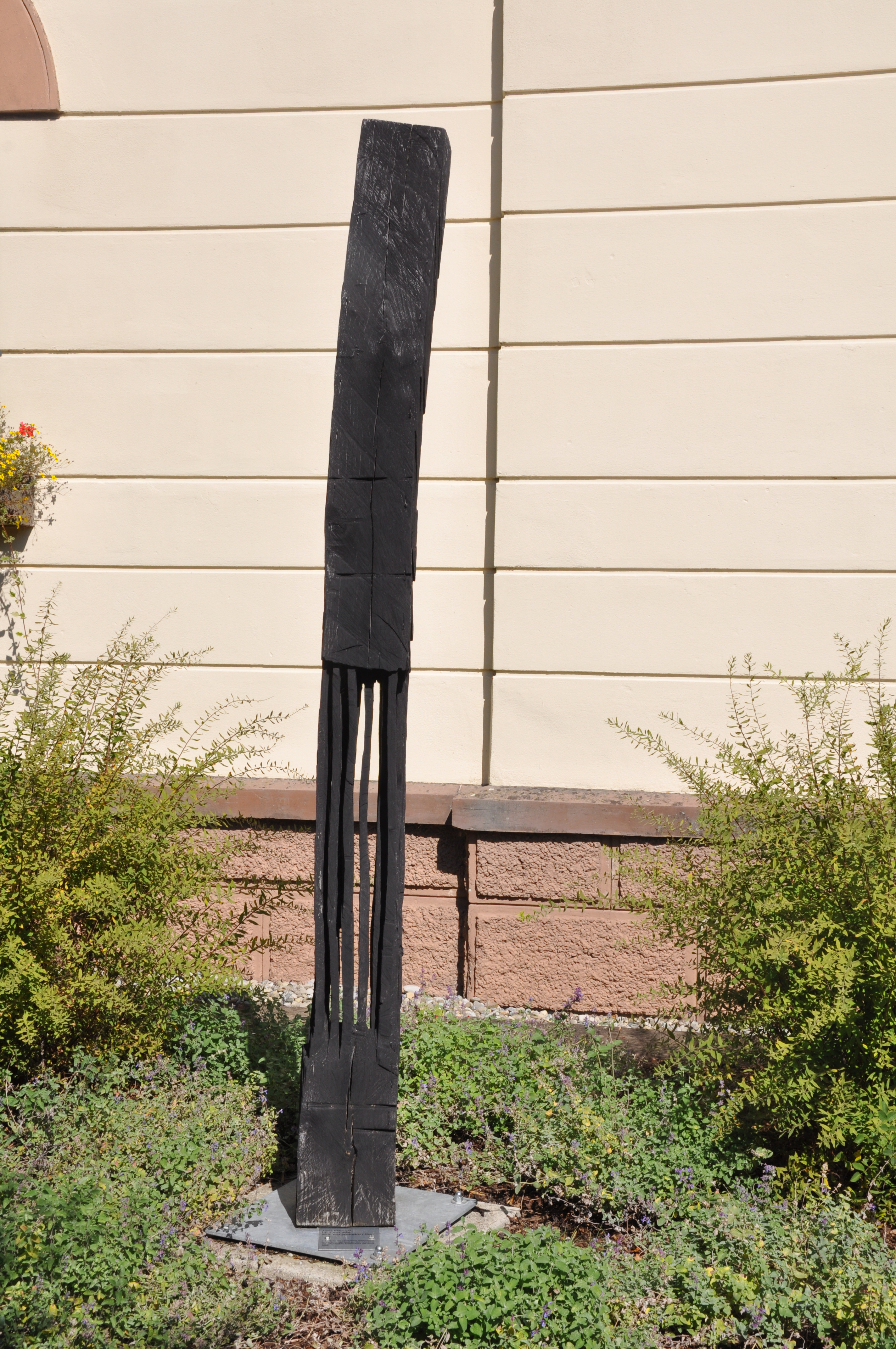 Wald (Hohenzollern), Landkreis Sigmaringen, Skulptur "Ohne Titel" von Armin Göhringer, 2007, vor dem Rathaus